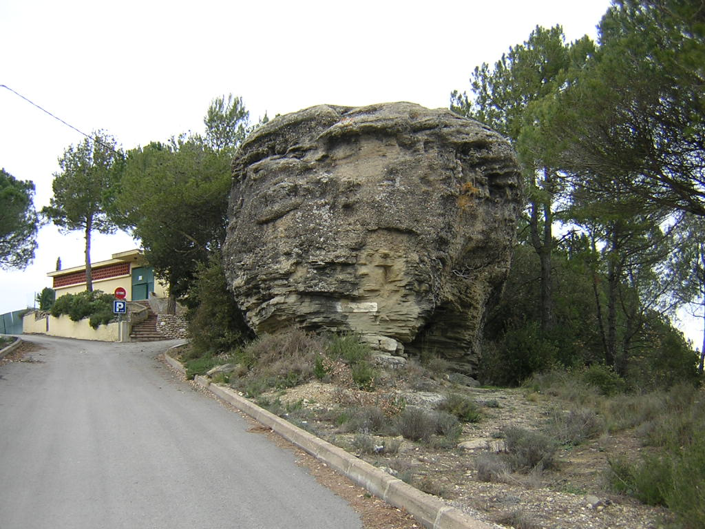 El Codro Gros (Monistrol de Calders, Moianès)